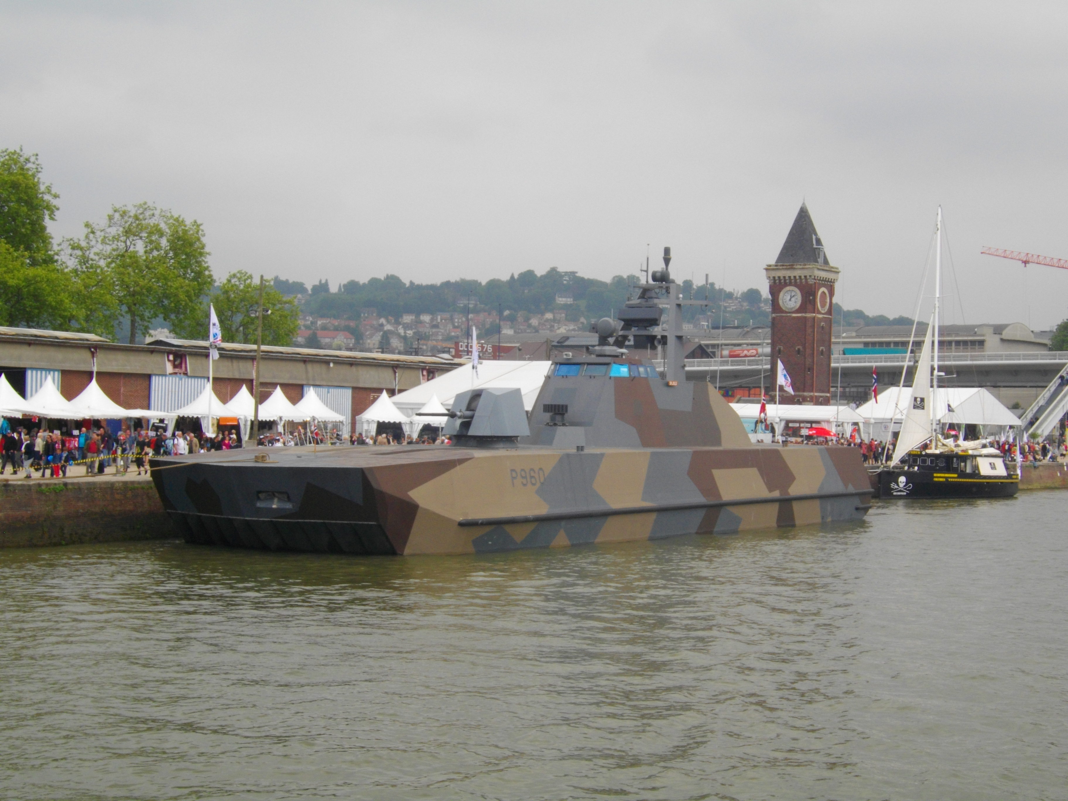 Le patrouilleur norvégien KNM Skjold (Armada Rouen 2013)